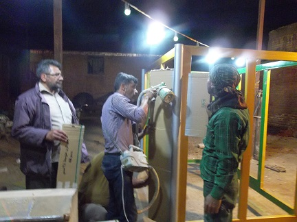 ساخت ضریح